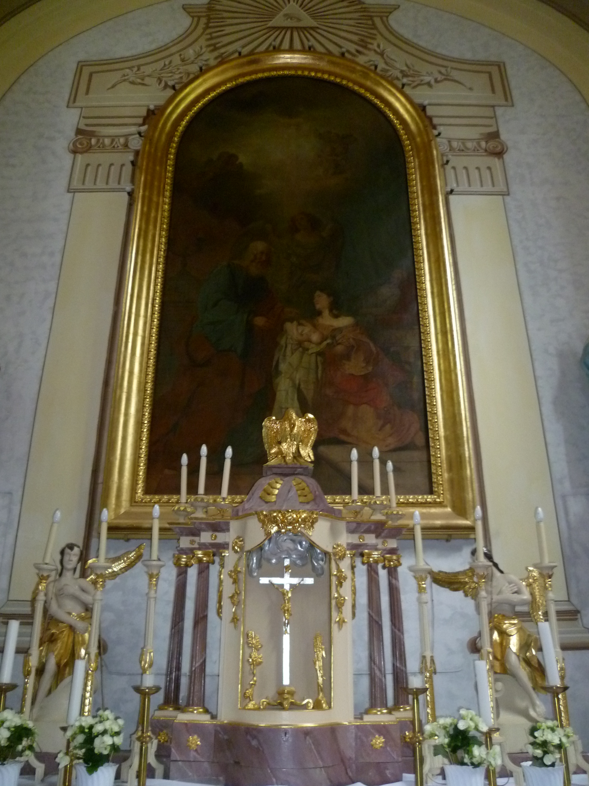 A bánhorváti római katolikus templom főoltára